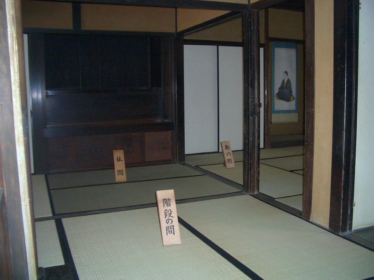 本居宣長旧宅内部